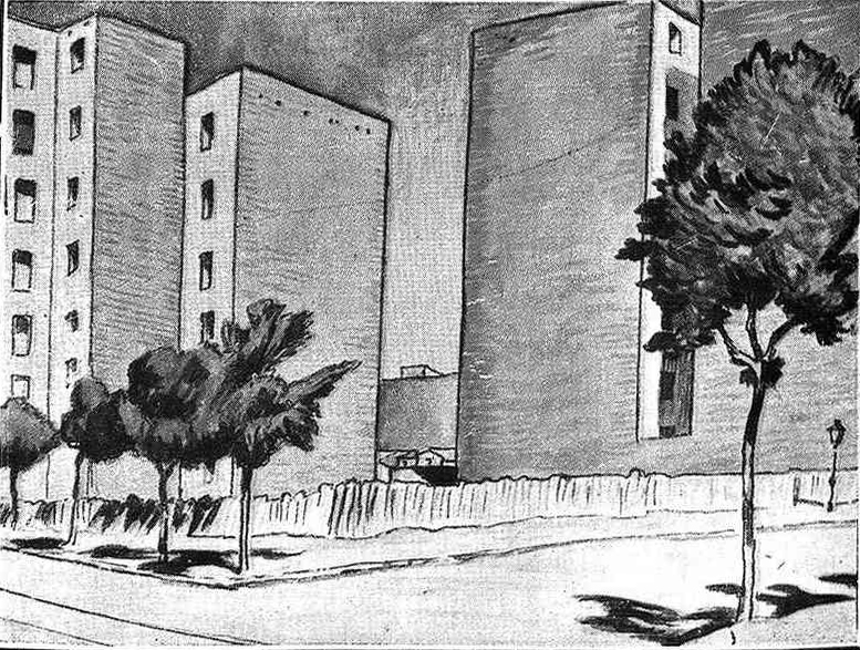 La villa de los solares. Cómo avanza Madrid. Calle de Hermosilla